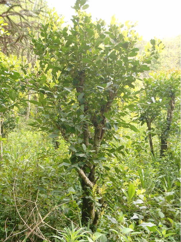 Nombre científico: Ilex paraguariensis Nombres comunes. Ka’ a yerba mate (Paraguay) Yerba mate (argentina) Erva mate (Brasil).